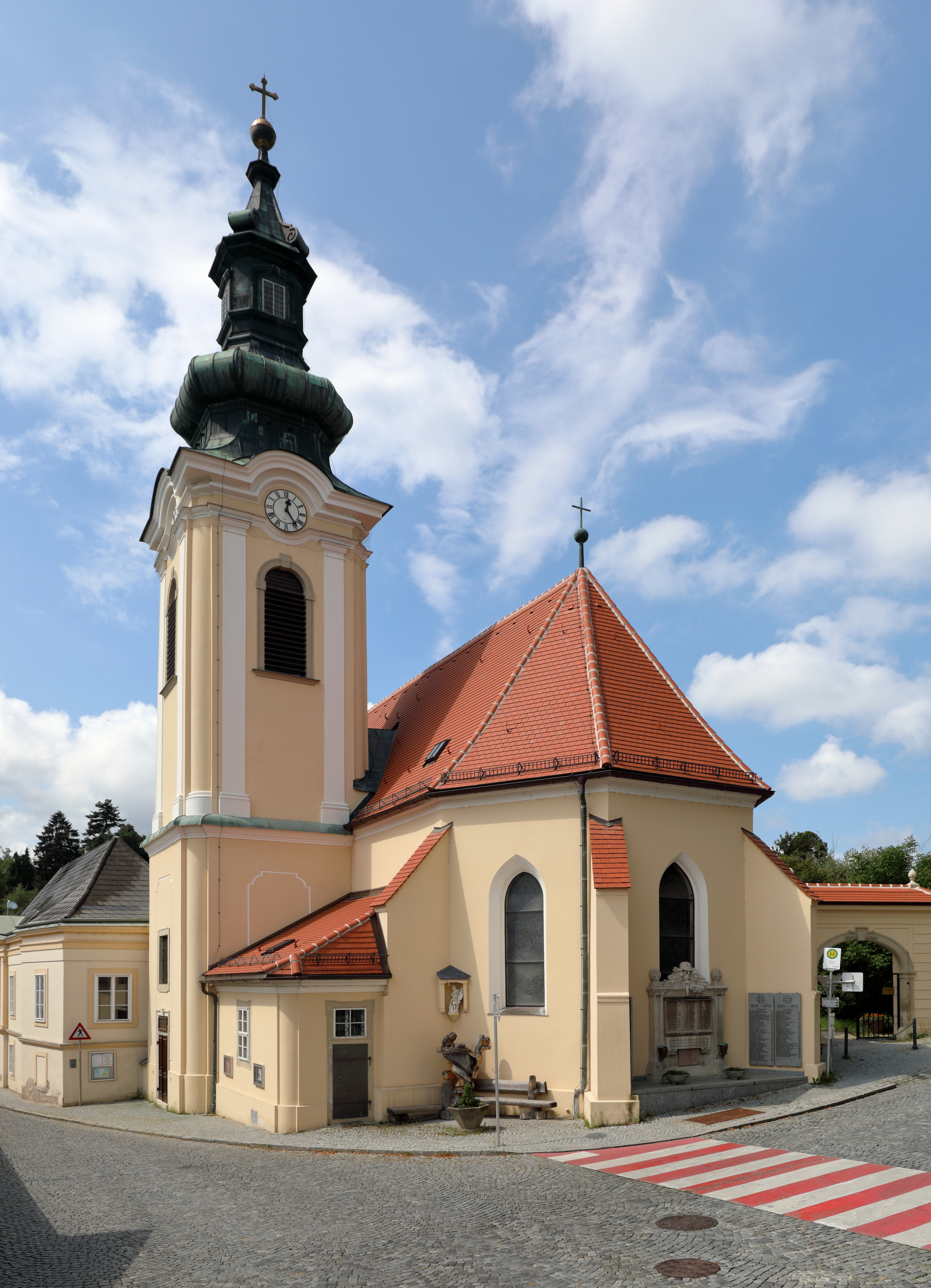 Die röm.-kath. Pfarrkirche hll. Peter und Paul im Ortszentrum von Weidling, ein Dorf in der politischen Stadtgemeinde Klosterneuburg.Die Kirche wurde Anfang des 15. Jahrhunderts als Kapelle errichtet. Nach der Türkenbelagerung erfolgte Ende des 17. Jahrhunderts ein Wiederaufbau und eine Erweiterung. Der jetzige Glockenturm mit dem Zwiebelhelm wurde 1831 nach den Plänen des Stifts- und Stadtbaumeister Ignaz Decherbauer errichtet.